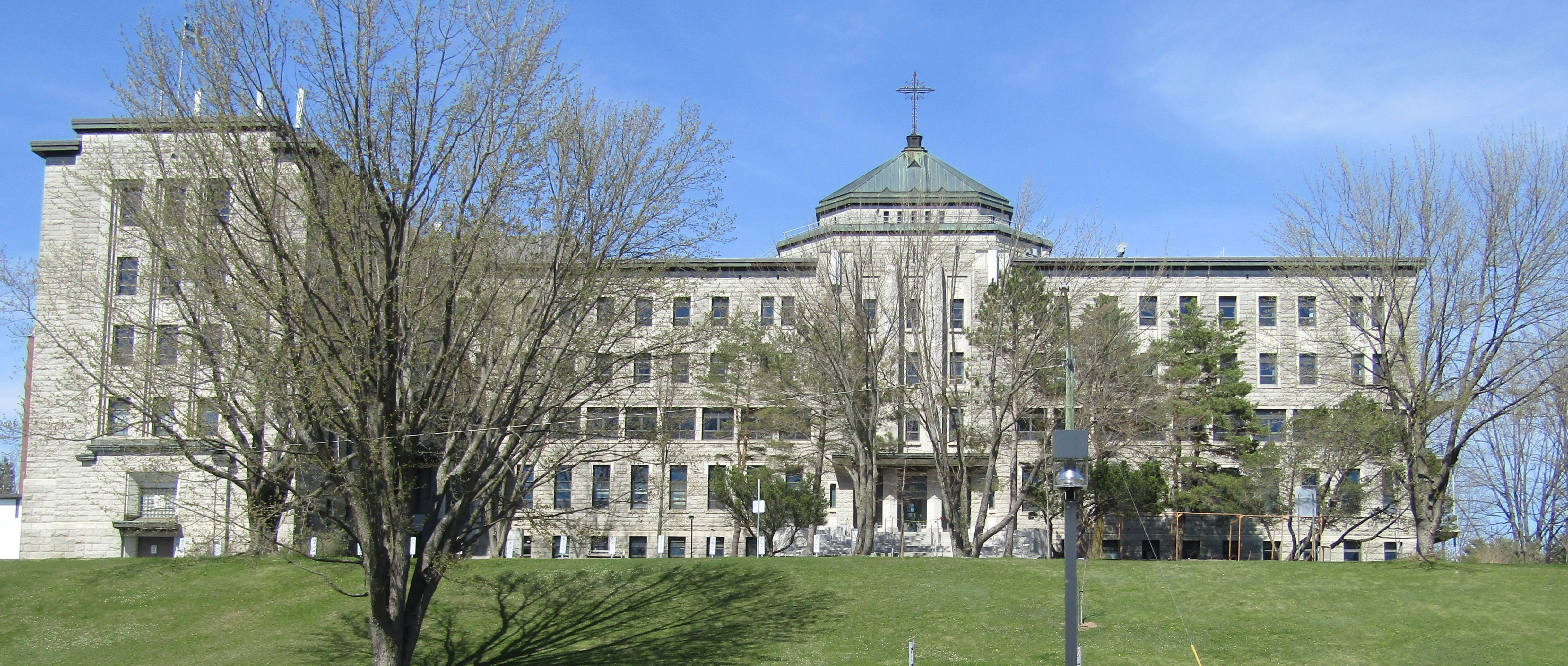 Petit Séminaire de Saint-Georges de Beauce fondé en 1946, devenu le Cégep Beauce-Appalaches en 1990.